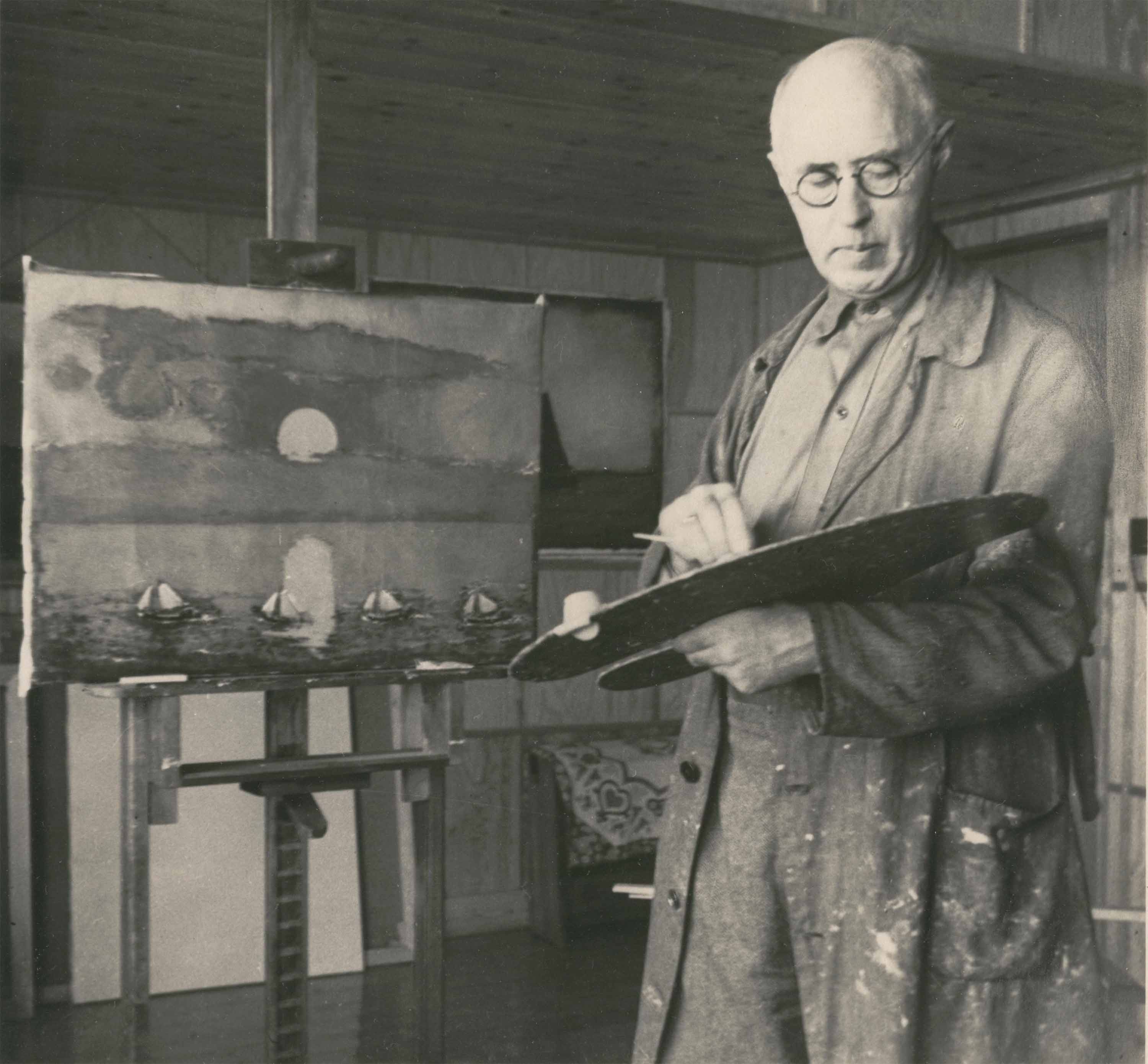 Maleren Ernst Zeuthen (1880-1938) i sit atelier.